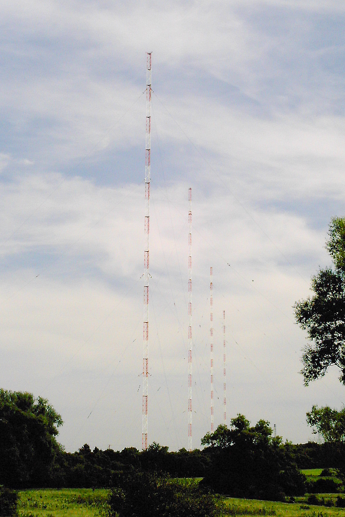 Photo 5a. Le système rayonnant principal du Felsberg.